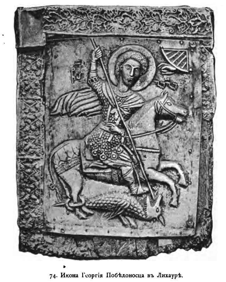 ქართული სიზველეები